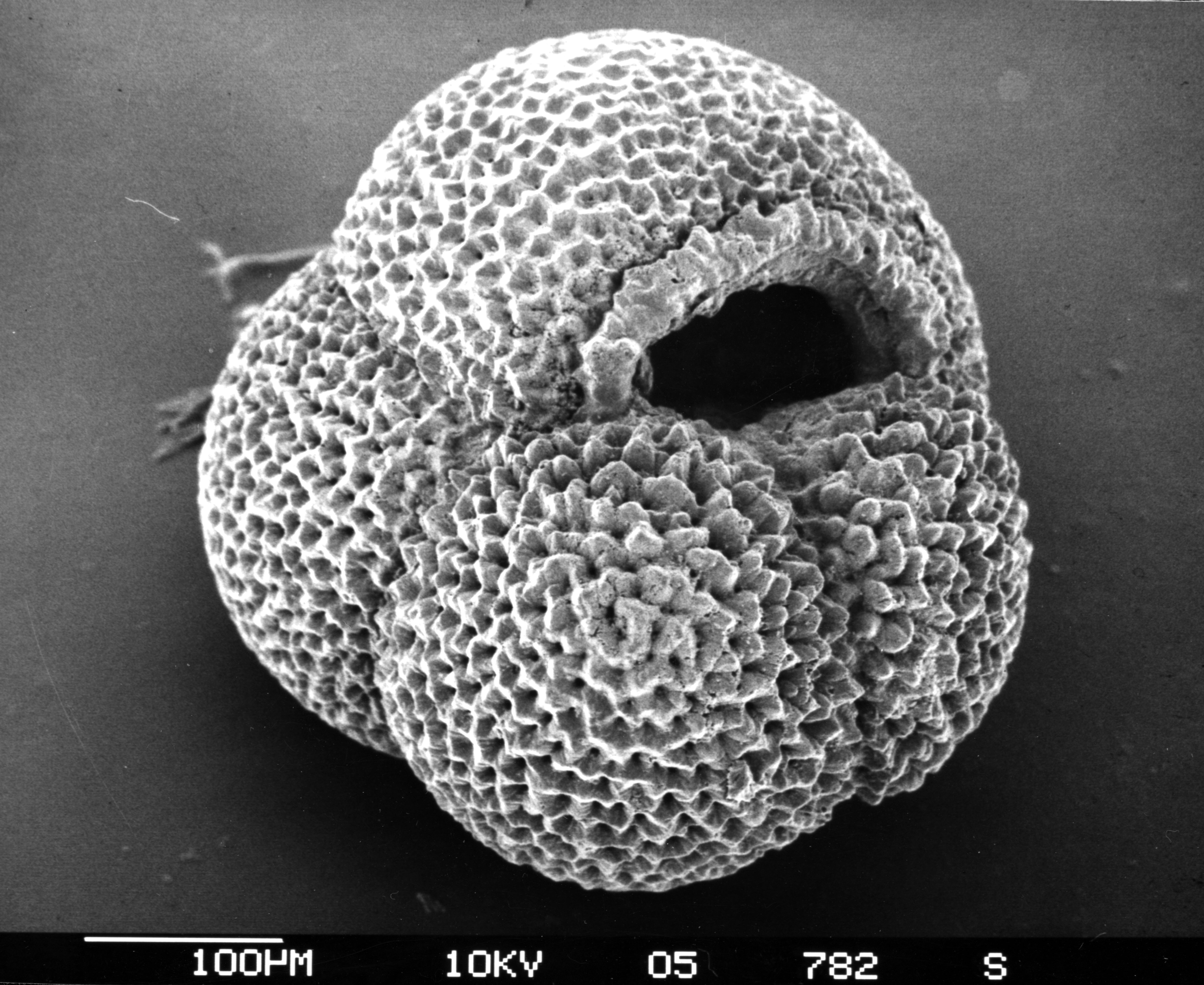 Microfossils from marine sediments - planktonic foraminifera Neogloboquadrina pachyderma